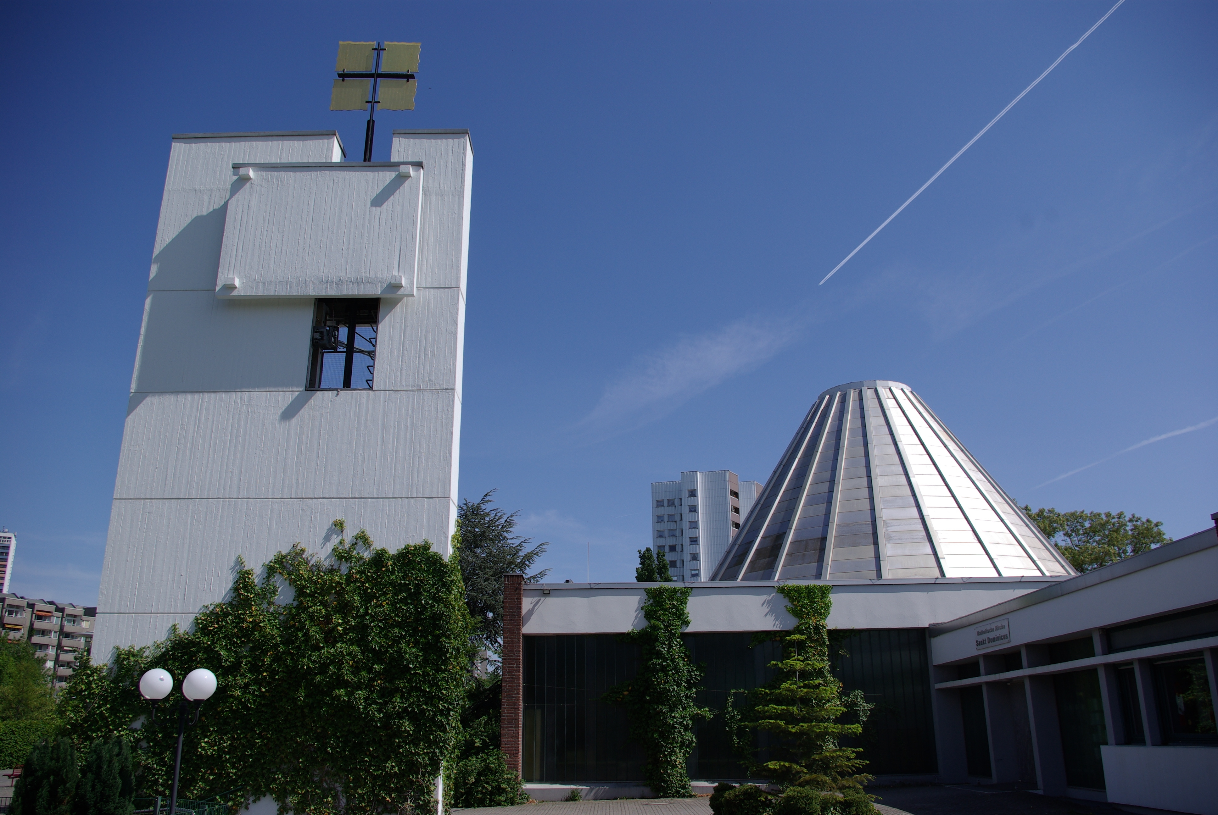 Gropiusstadt in Berlin. Die katholische Kirche St. Dominicus in der Lipschitzallee 74 wurde von 1975 bis 1977 erbaut. Die Kirche steht unter Denkmalschutz.